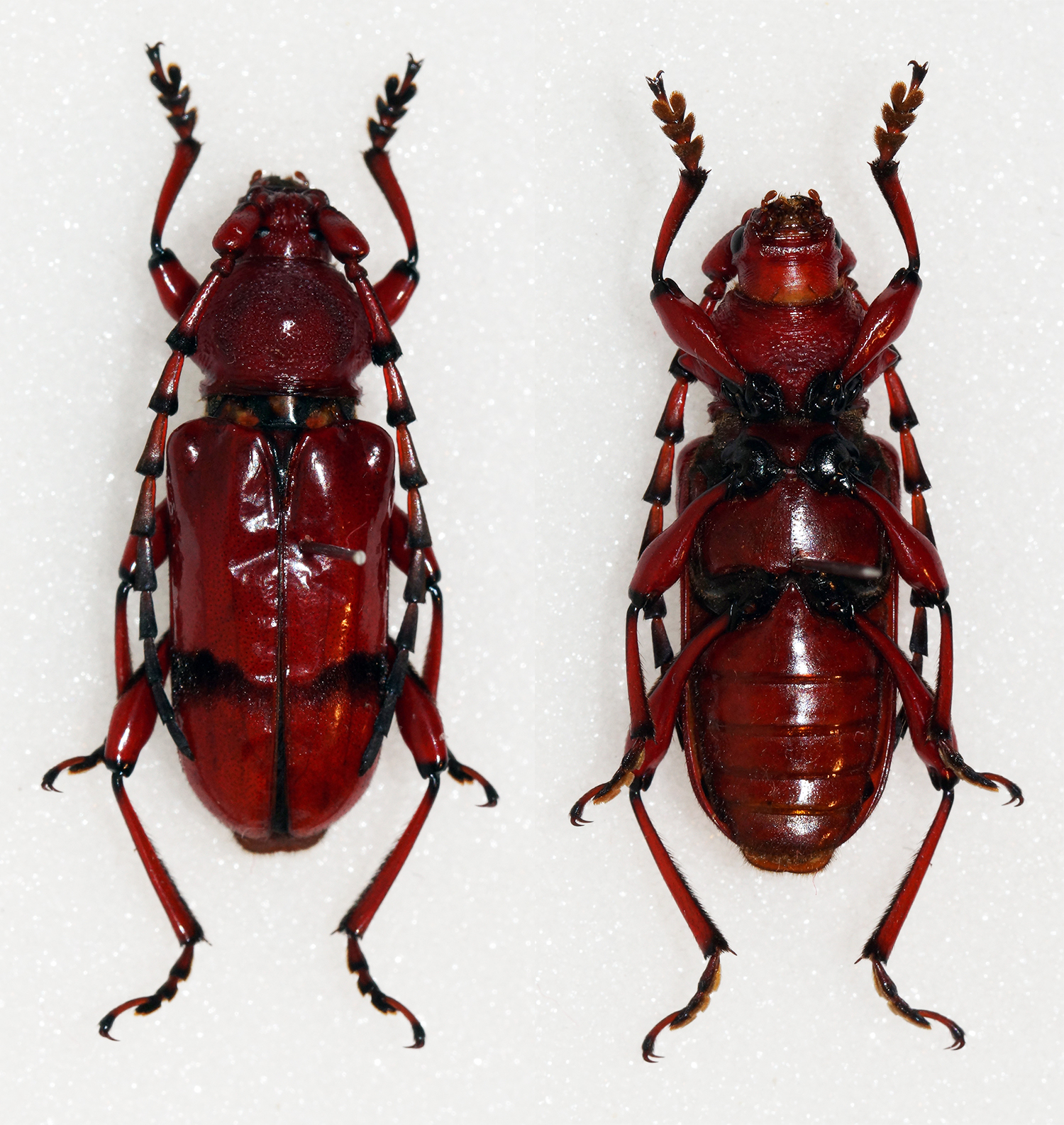 Gahan,1900 Sex: ? Data: 25-04-14 - Mt Dayaoshan - 1200m - Pingban - Jinxiu - Guangxi - China Size: 23.5mm